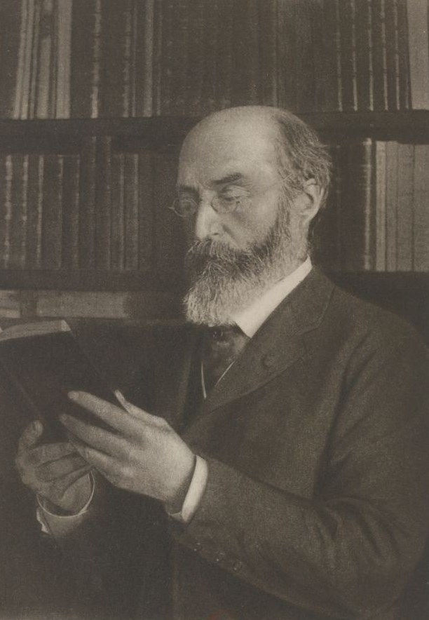 Adolphe Carnot.